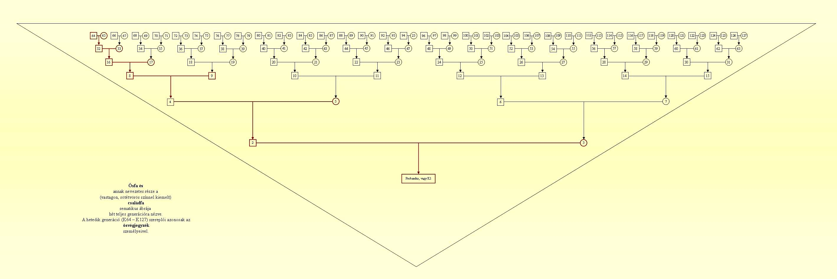 Szemléltető ábra a Wikipédia Családfakutatás szócikkéhez